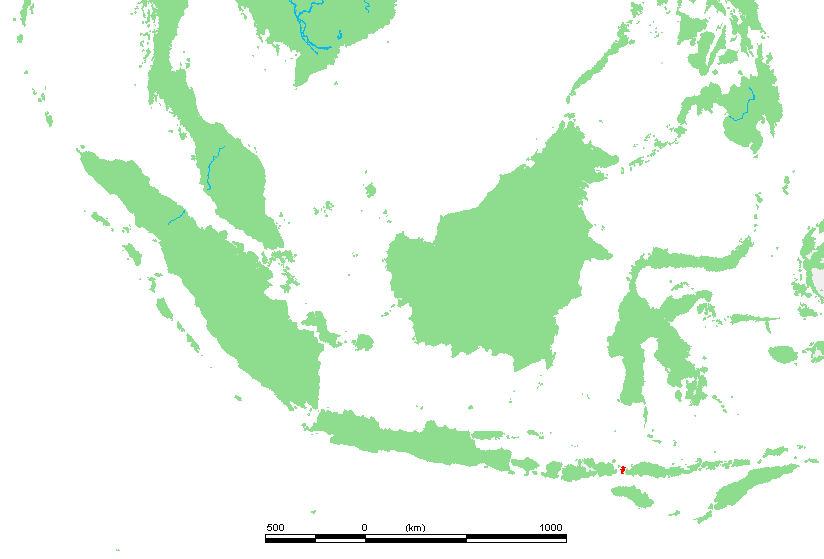 ID Tidore.PNG